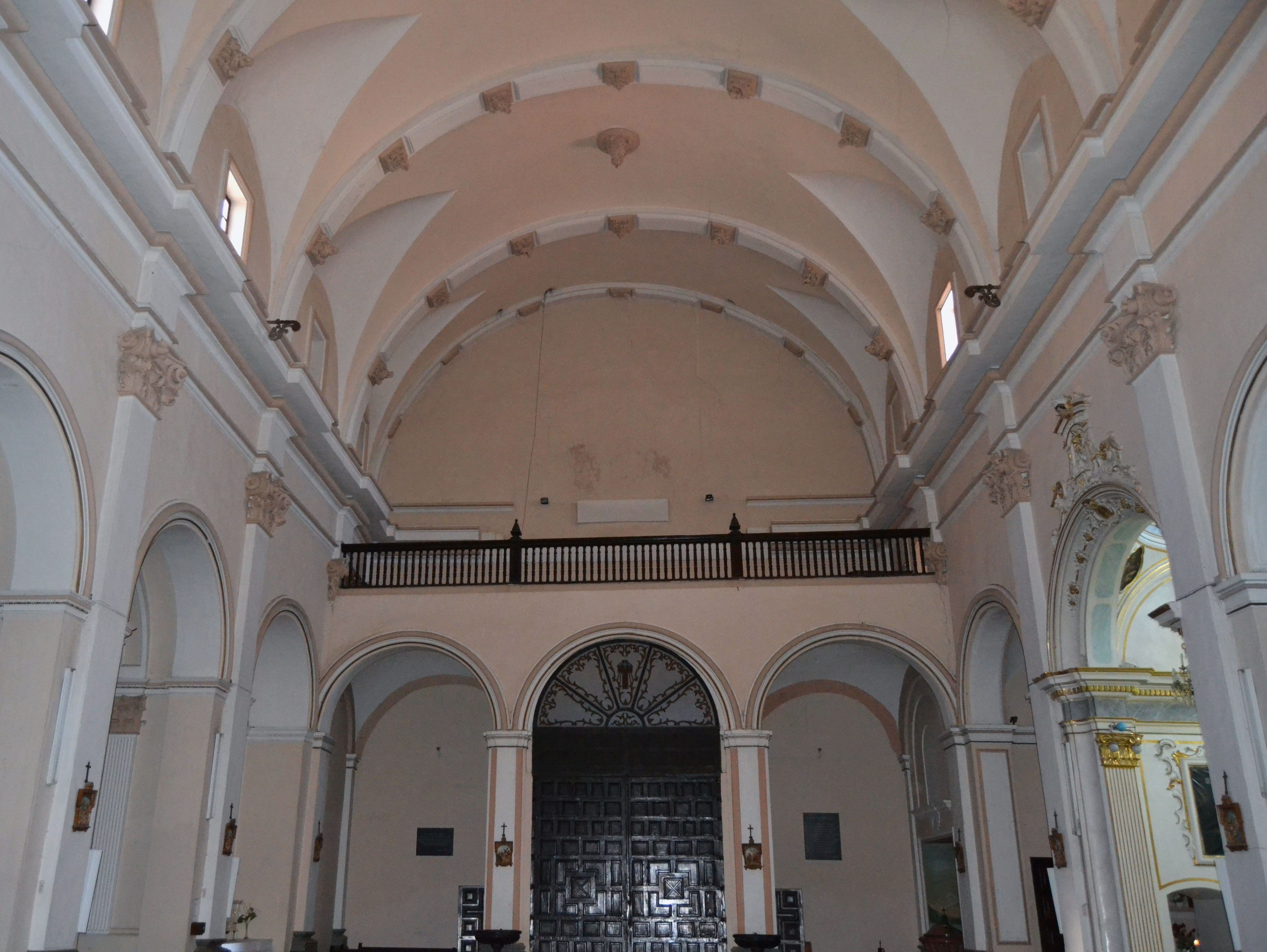 Església de santa Àgueda (Xèrica), vista cap als peus.